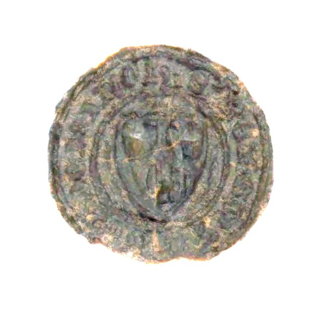 1410 Seal of the von Bilderling family in Westphalen